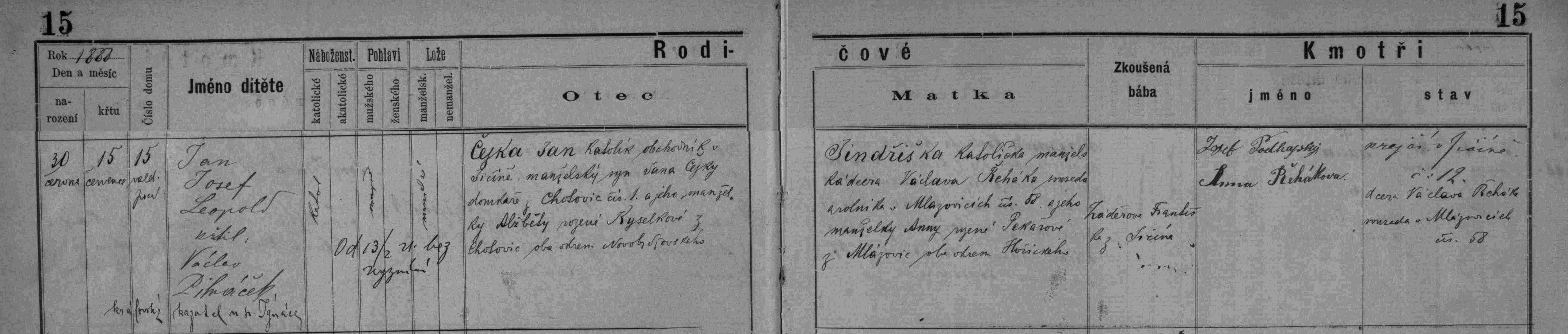 matrika narozených 1888-1904 města Jičín, záznam o narození ak.mal. Jana Čejky